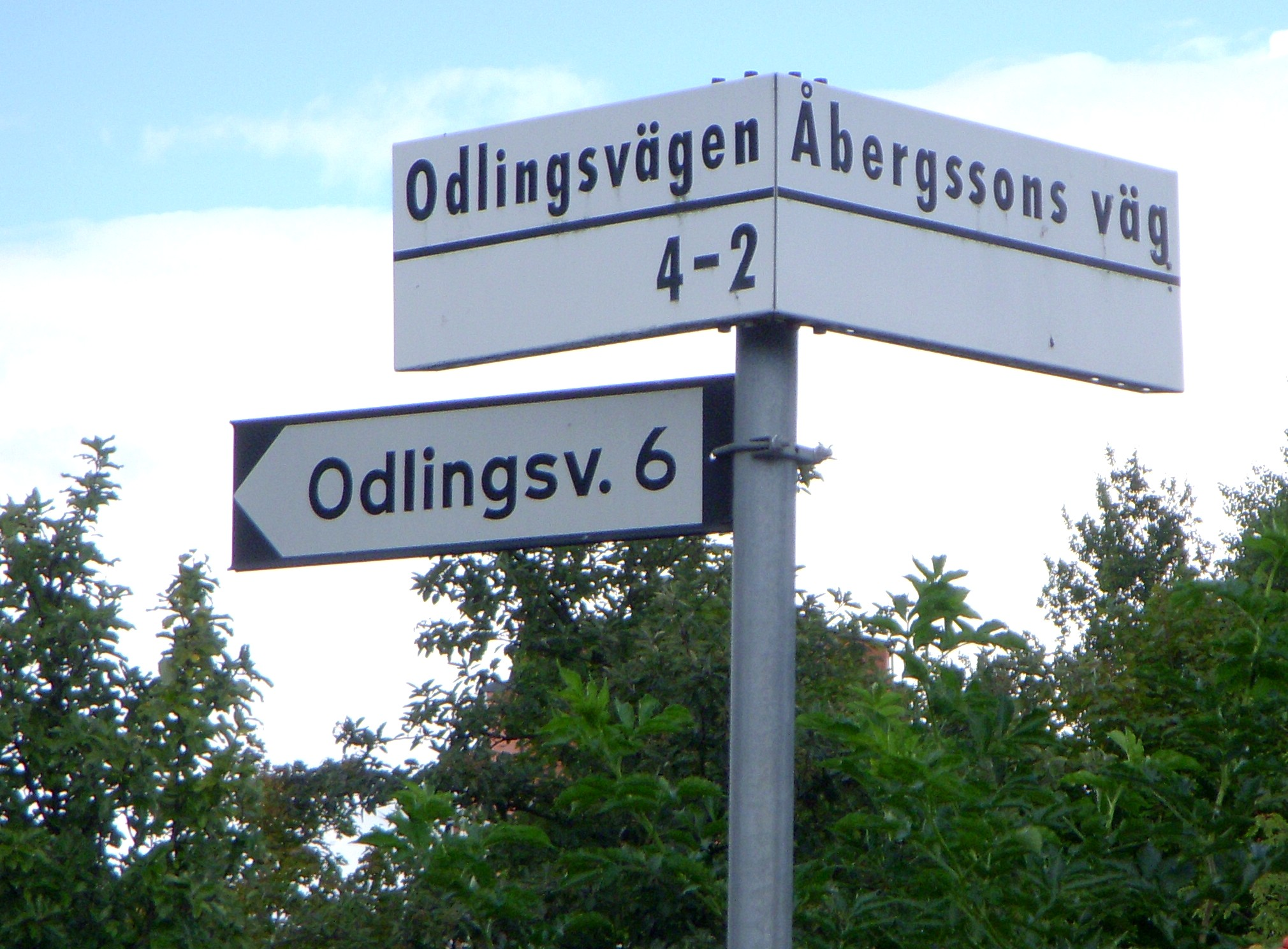 Gatuskylt till minne av Anna Åbergsson i Bergshamra